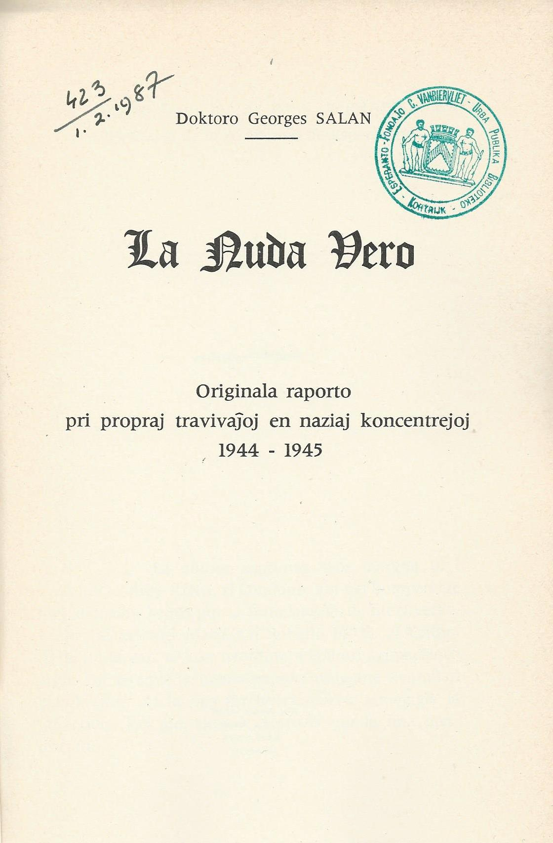 librokovrilo de libro "La Nuda Vero", 1975